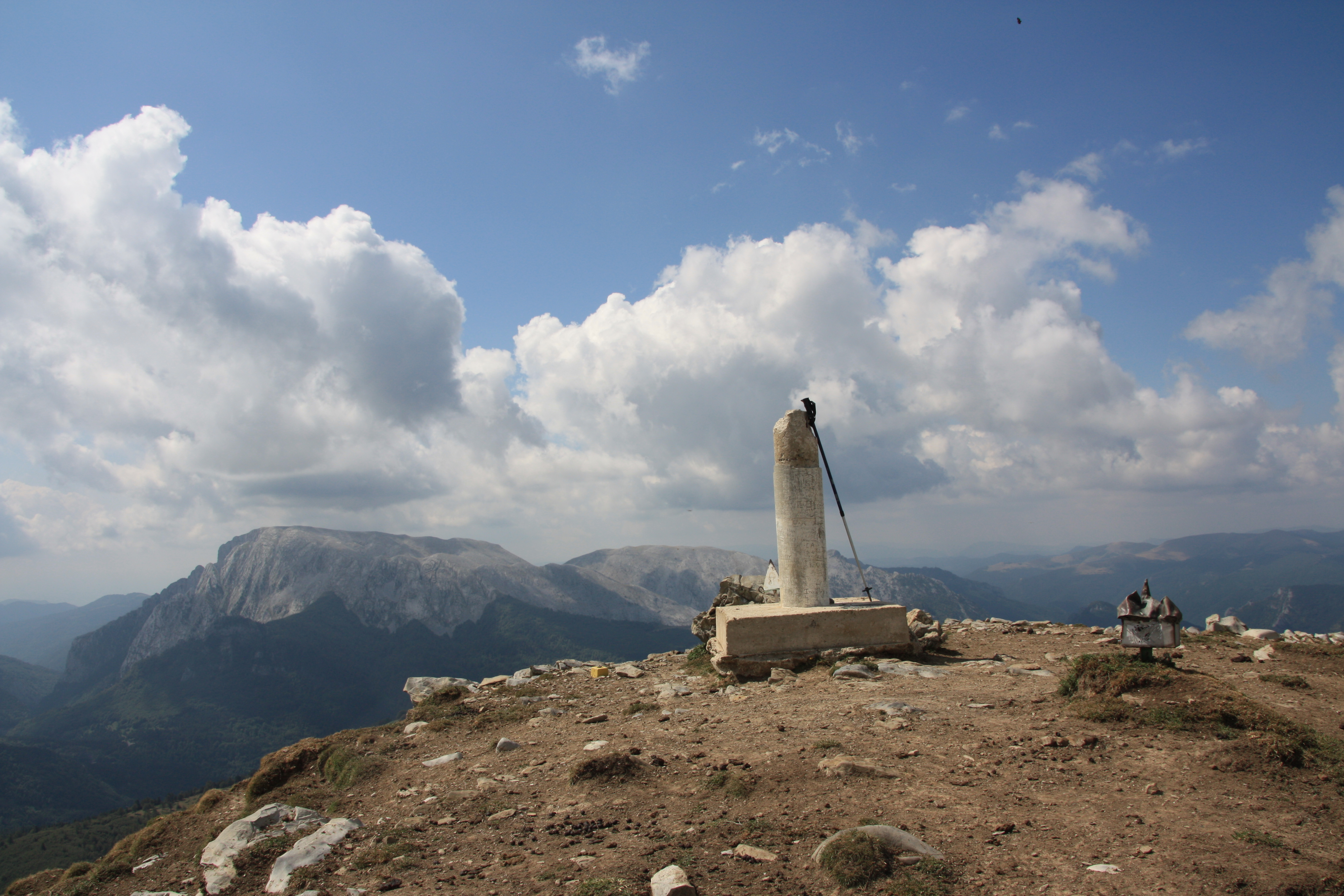 Txamantxoiaren gailurra.